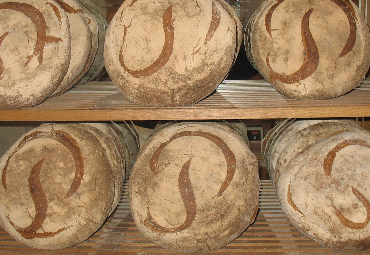 Pain Poîlane, boutiques du 49 boulevard de Grenelle, Paris 15e, France